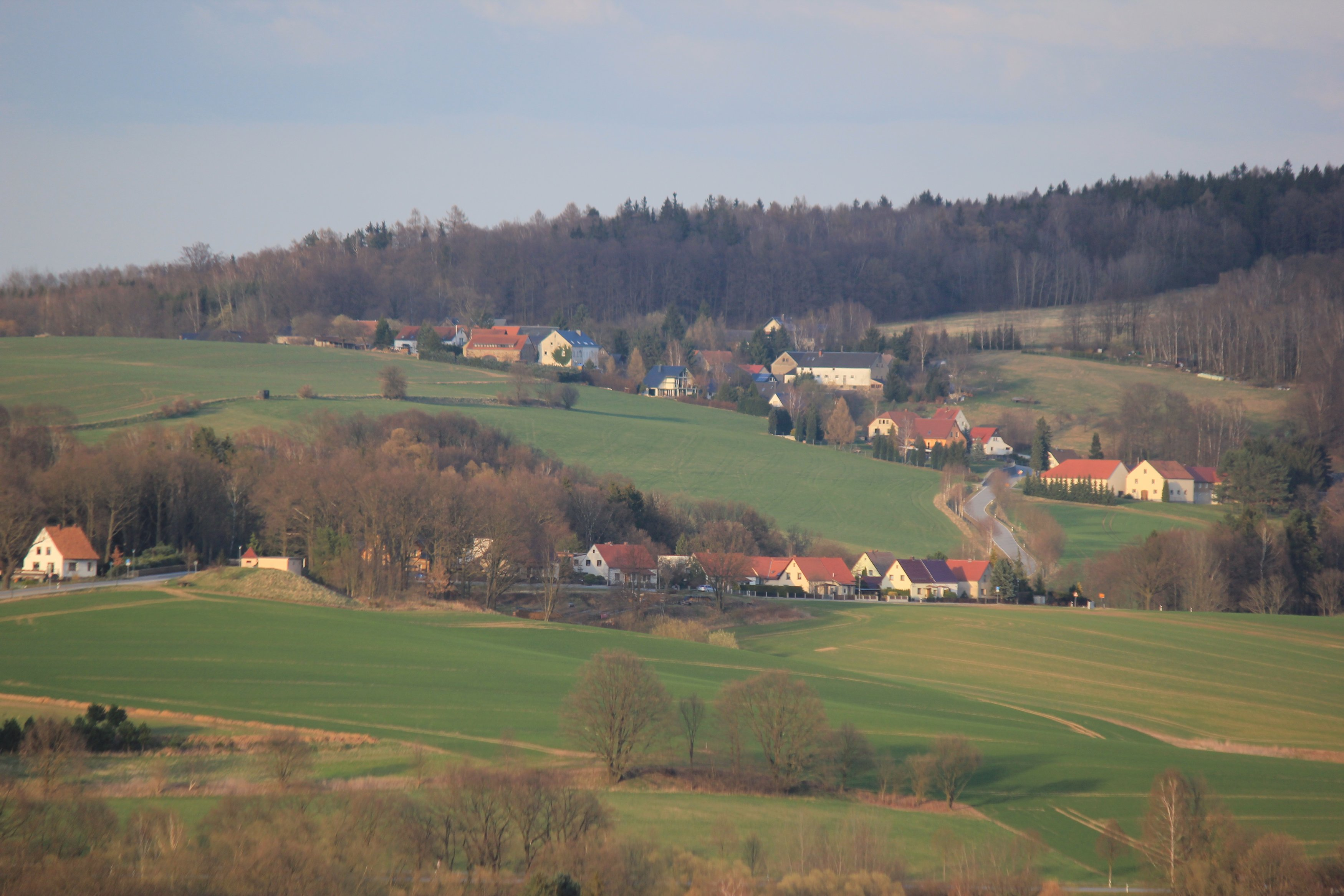 Hornjoserbsce: Napohlad Kózłow z juhozapada.